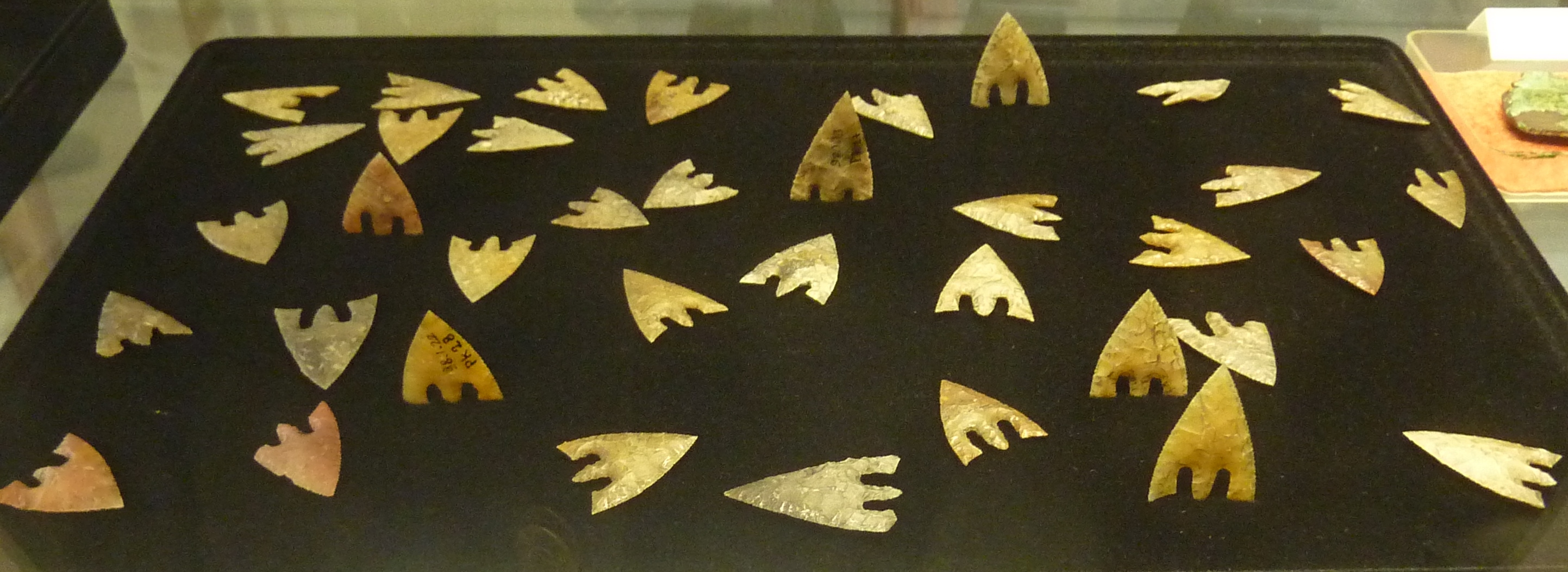 Pointes de flèche en silex du modèle armoricain ogival court datant de l'âge du bronze ancien trouvées dans le tumulus de Kersandy en Plouhinec (Finistère) (Musée de la préhistoire finistérienne de Penmarc'h)